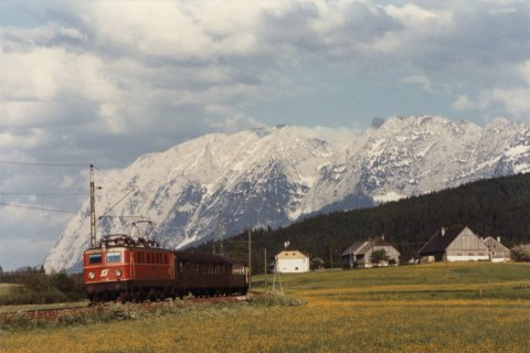 Zwischen Bad Mitterndorf und Kainisch erreicht die Salzkammergutbahn ihren höchsten Punkt (im Hintergrund der Grimming).